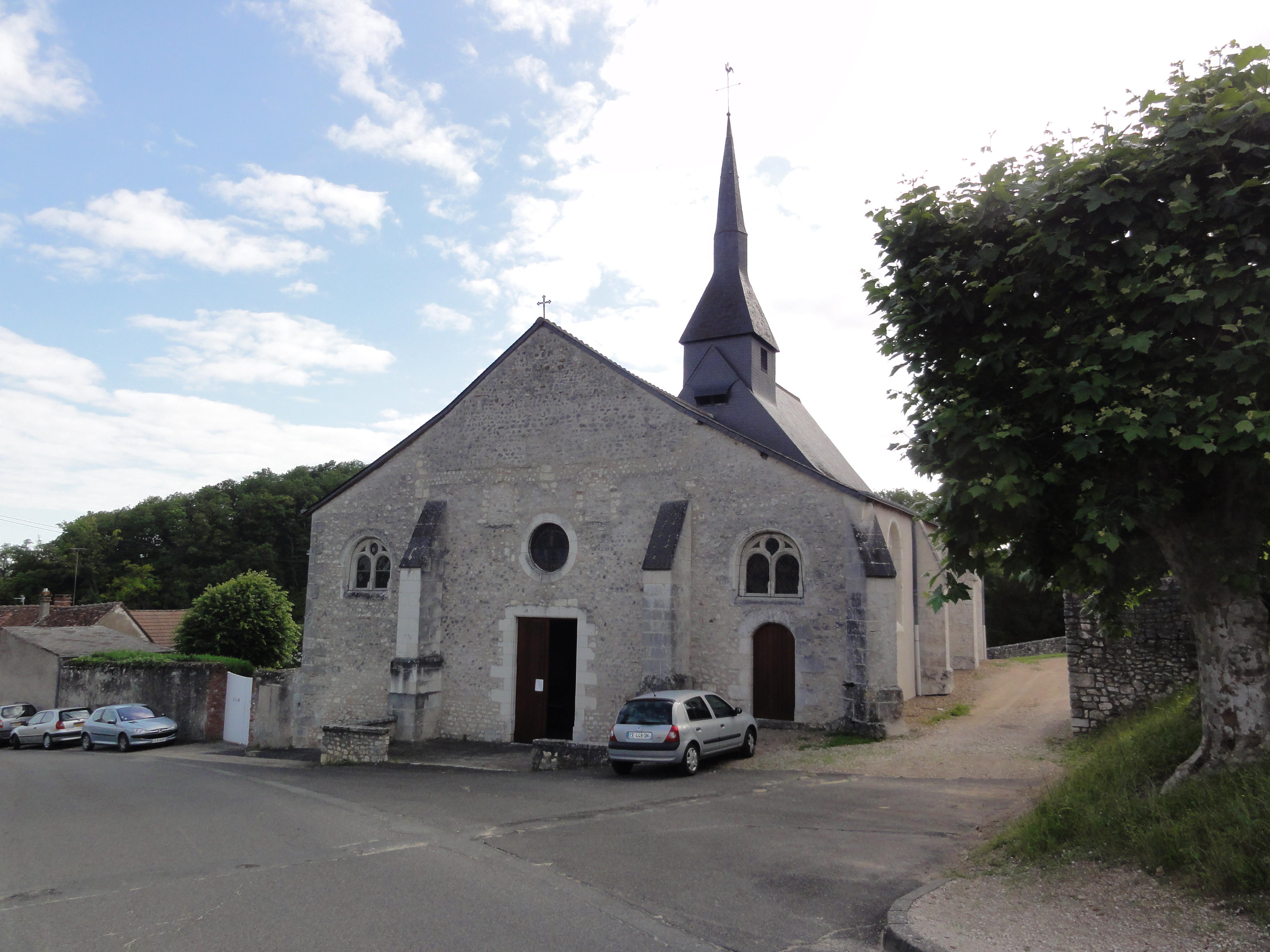 Chailles (Loir-et-Cher) église Saint-Martin